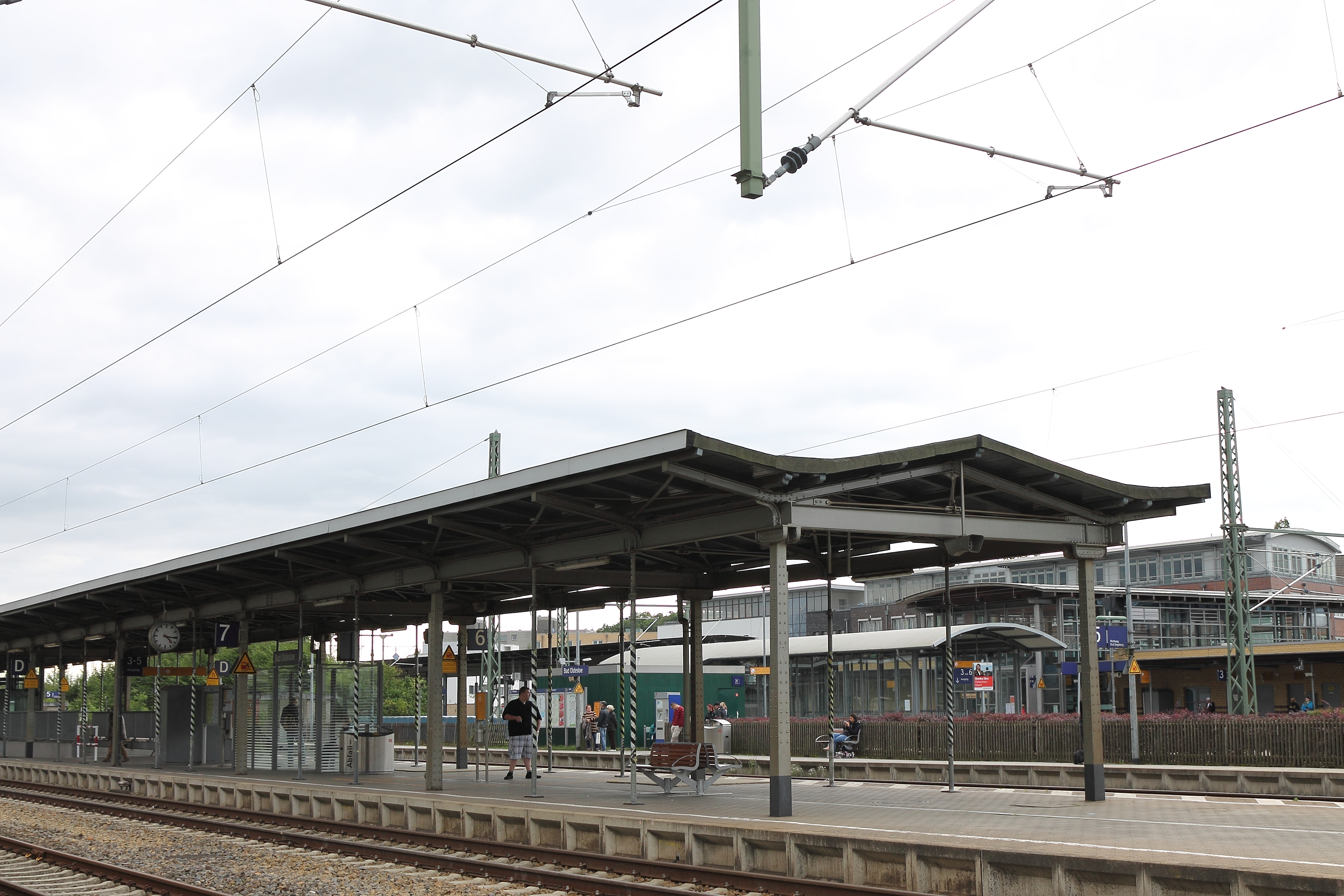 Unter Denkmalschutz stehendes Dach am Oldesloe Bahnsteig zwischen Gleis 6/7